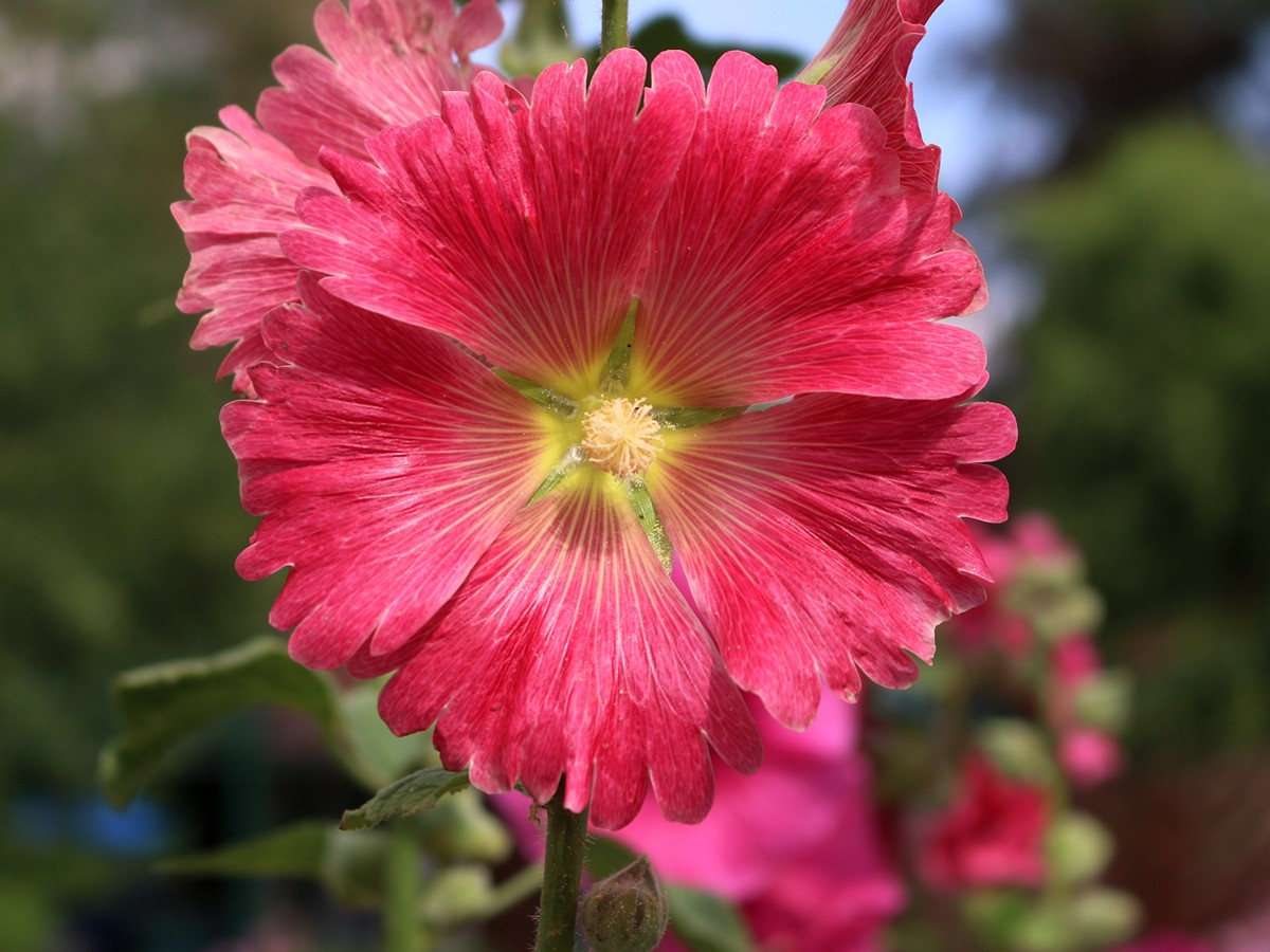 Stockrose